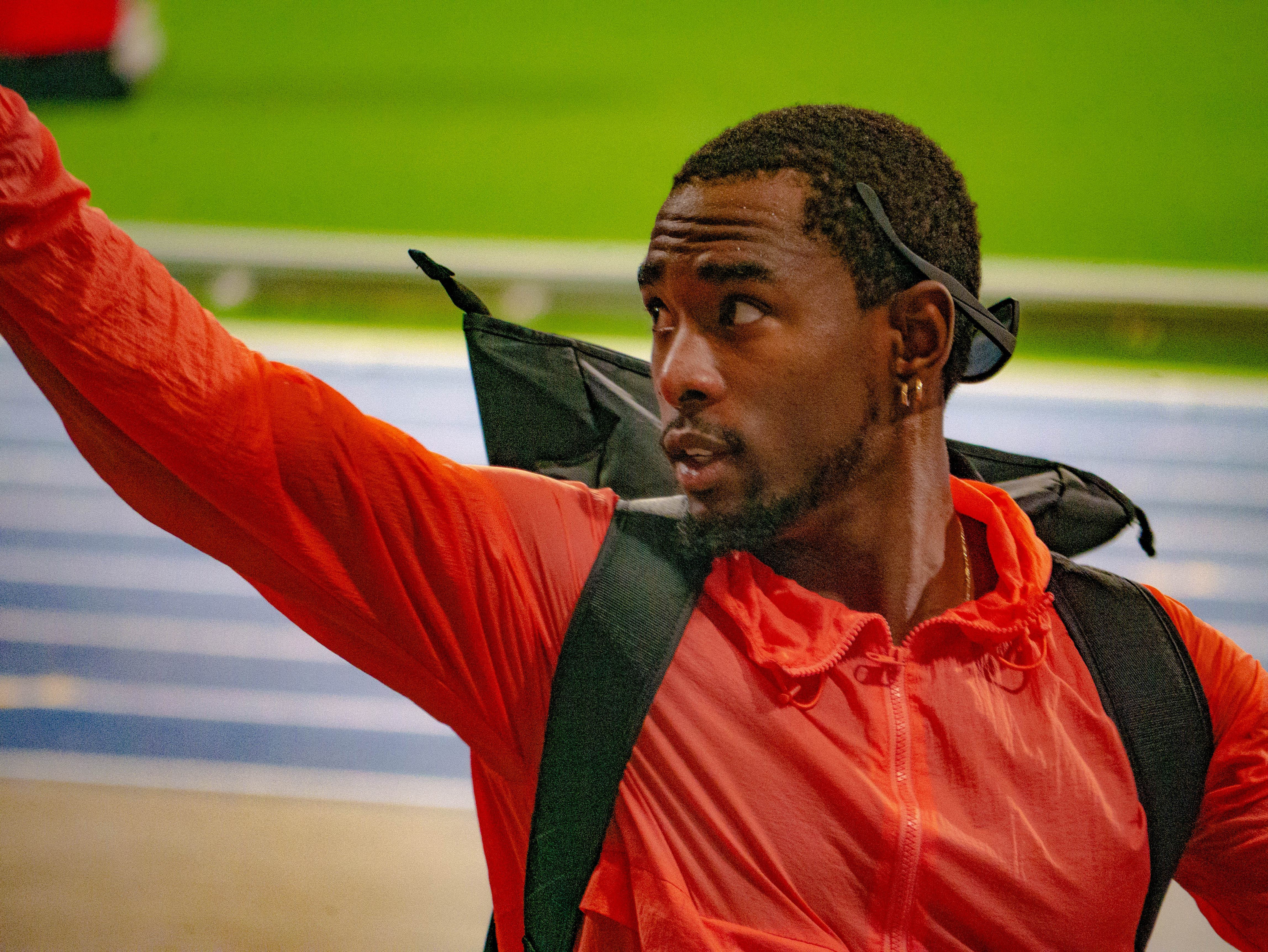 Meeting de Paris 2019 - Compétition d'athlétisme au stade Charlety - 24 août 2019